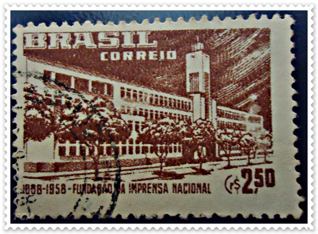 Selo do Correio do Brasil pelos 150 anos da Imprensa Nacional